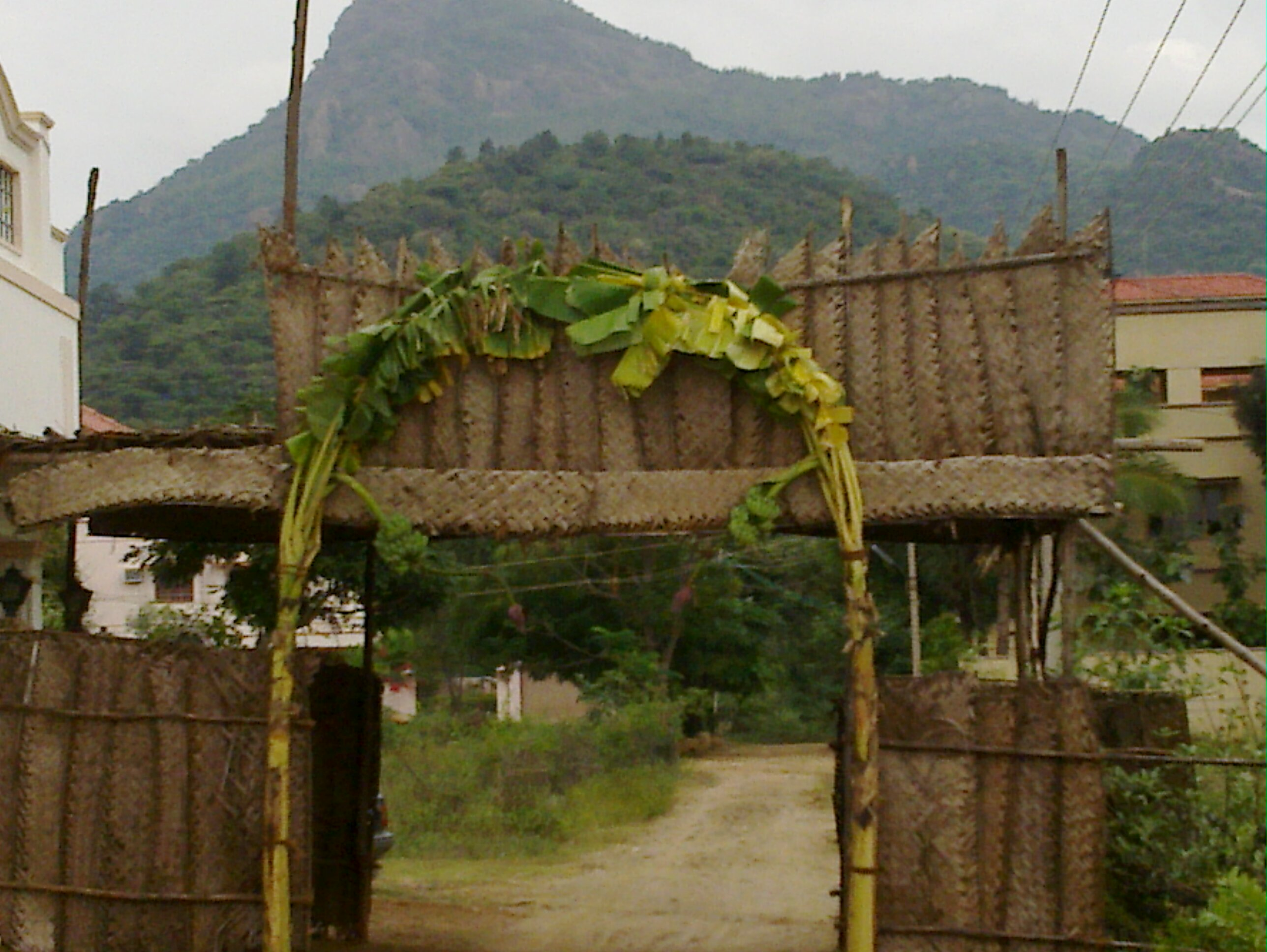 திருமணத்திற்காகப் போடப்படும் பந்தல்